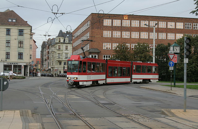 Knotenpunkt an der Stadhalle (2)